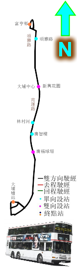 中文（香港）: 九巴71A線的走線圖